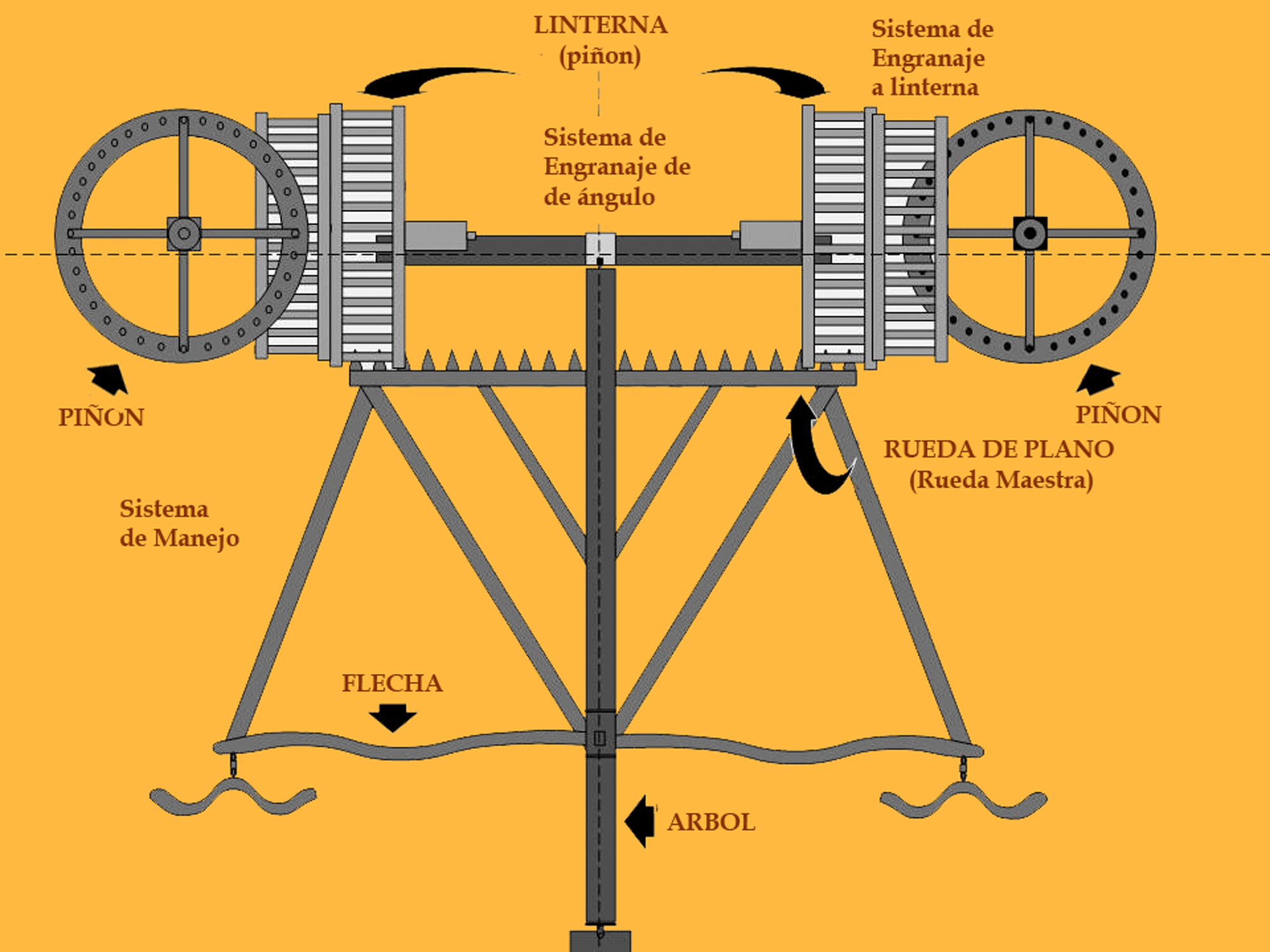 Dibujo de maquinas laminadoras